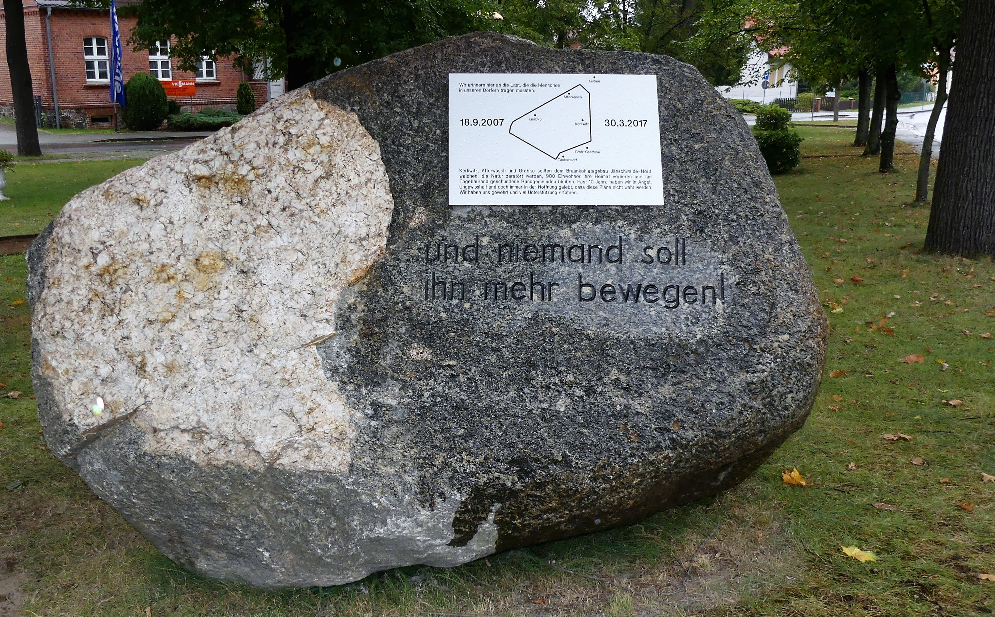 Gedenkstein aus Anlass des 10 Jahre währenden Kampfes gegen die Abbaggerung durch Vattenfal, später LEAG. Der Stein steht in der Ortsmitte von Kerkwitz